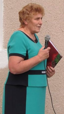 Директор школи, Богдана Гермак, під час Випускного - 2017